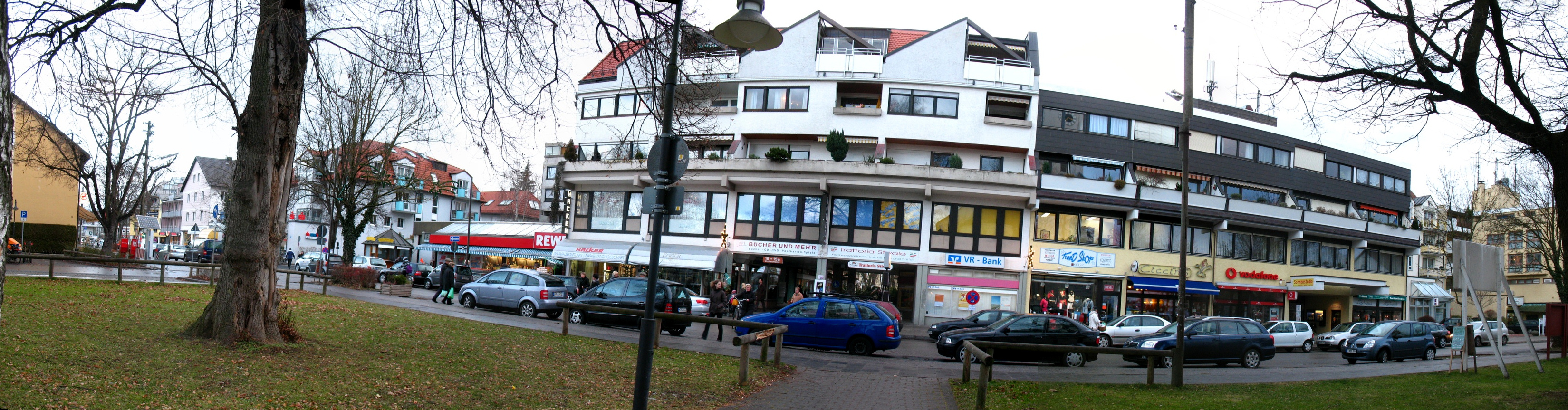 Deutschland, Bayern, Gröbenzell, Kirchenstraße (Panorama)